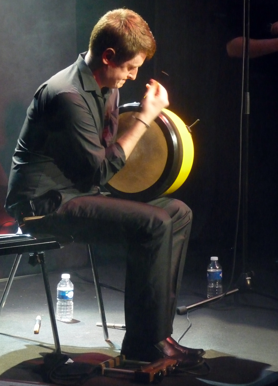 joueur irlandais de bodhrán en 2015